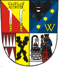 Znak města Žďár nad Sázavou